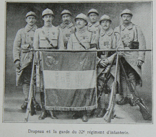 Drapeau de la garde du 32e régiment d'infanterie basé à Tours parue dans le quotidien local